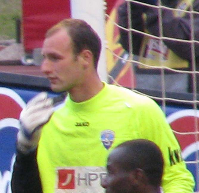 Goran Blažević